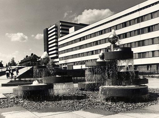 Historisches Bild der Klinikum Chemnitz gGmbH